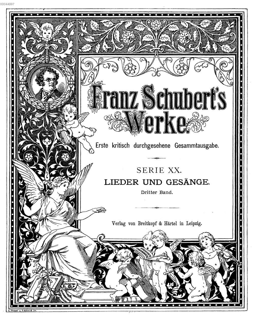 Franz Schubert's Werke